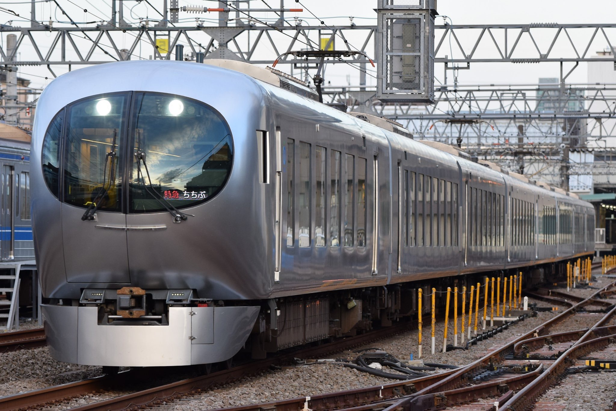 西武池袋線保谷駅付近を走行するLaview